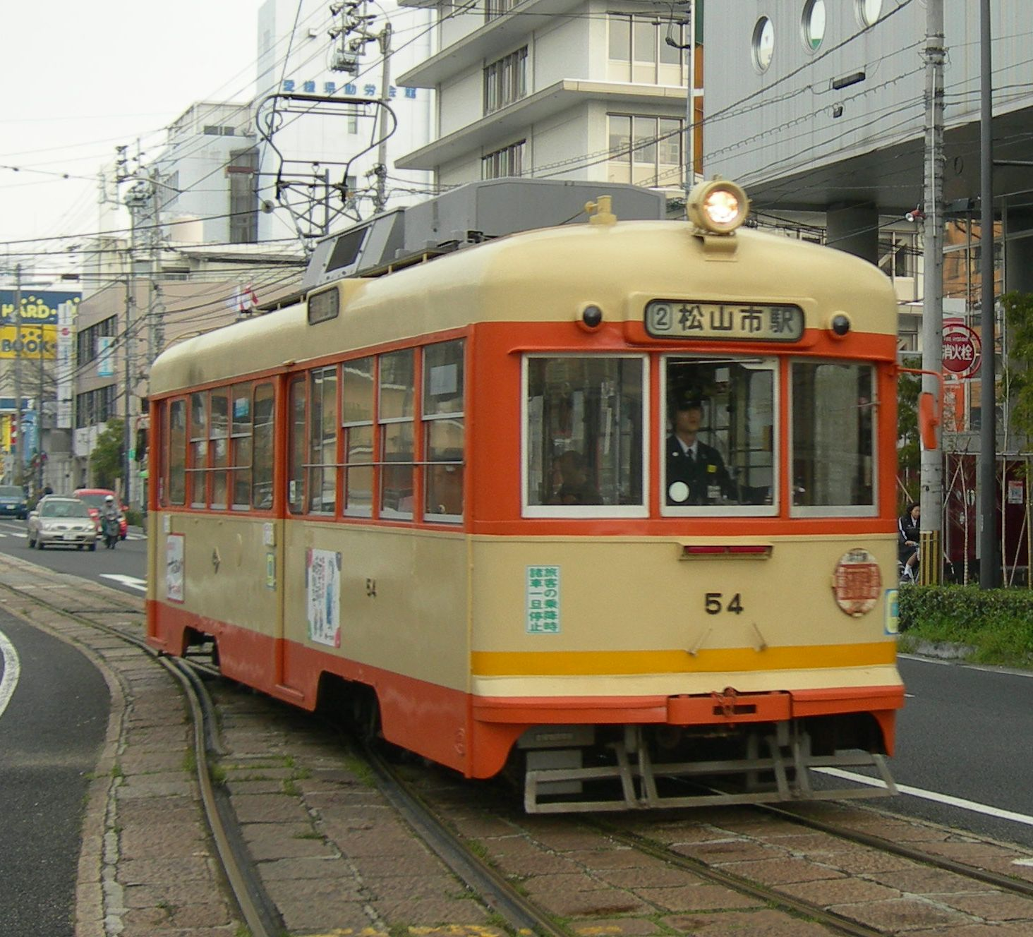 伊予鉄道モハ50形電車